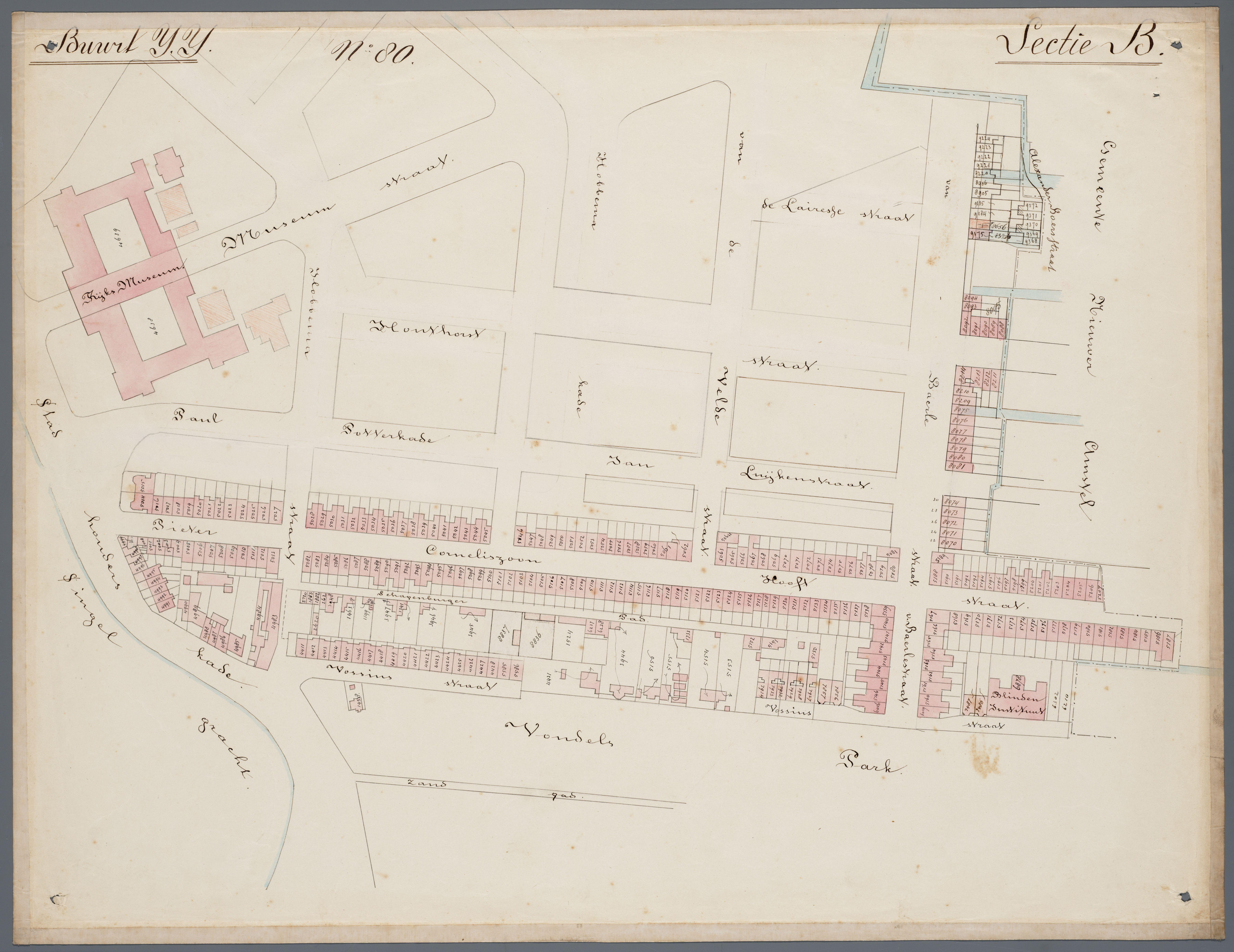 Beschrijving: Buurt YY (Kadastrale sectie B) Schaal 1:1.250. Het is een nieuw, handgetekend, blad dat aan de atlas werd toegevoegd. Getond wordt het gebied begrensd door de Singelgracht, de Vossiusstraat met het Blindenistituut, het Rijksmuseum en de Museumstraat (tegenwoordig Museumplein), de Alexander Boersstraat. In zwart staan de kadastrale nummers bijgeschreven. De huisnummering van 1875 ontbreekt. Oriëntatie: zuidoost boven. Documenttype: kaart Vervaardiger: Loman jr., J. C. (Jan; 1825-1897) Smulders & Co, J. Collectie: Collectie Stadsarchief Amsterdam: negentiende-eeuwse buurtatlaskaarten Datering: 1892 t/m 1903 Inventarissen: Afbeeldingsbestand 010043000002_098